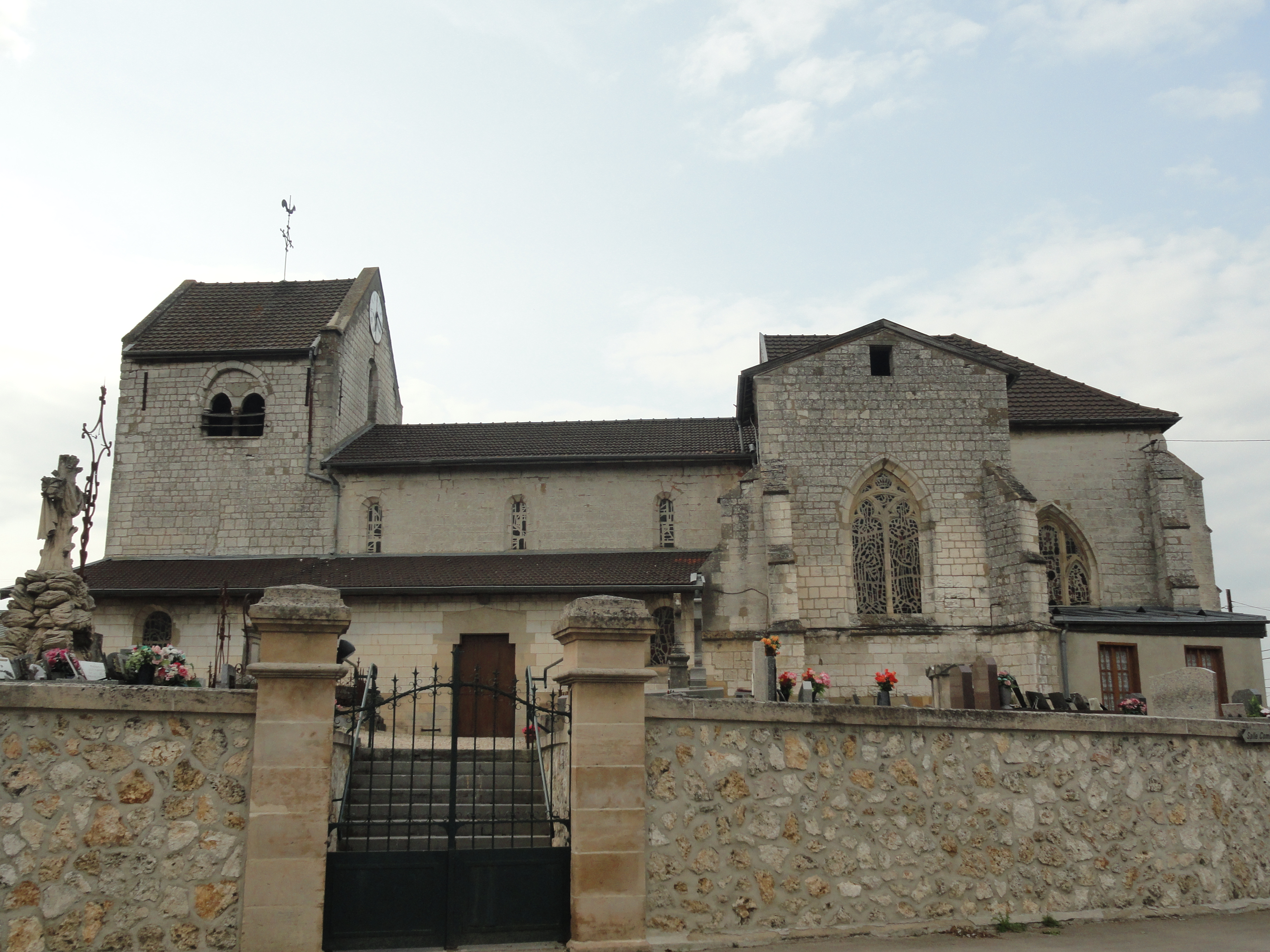 L'église Saint-Remi de Pringy (51).